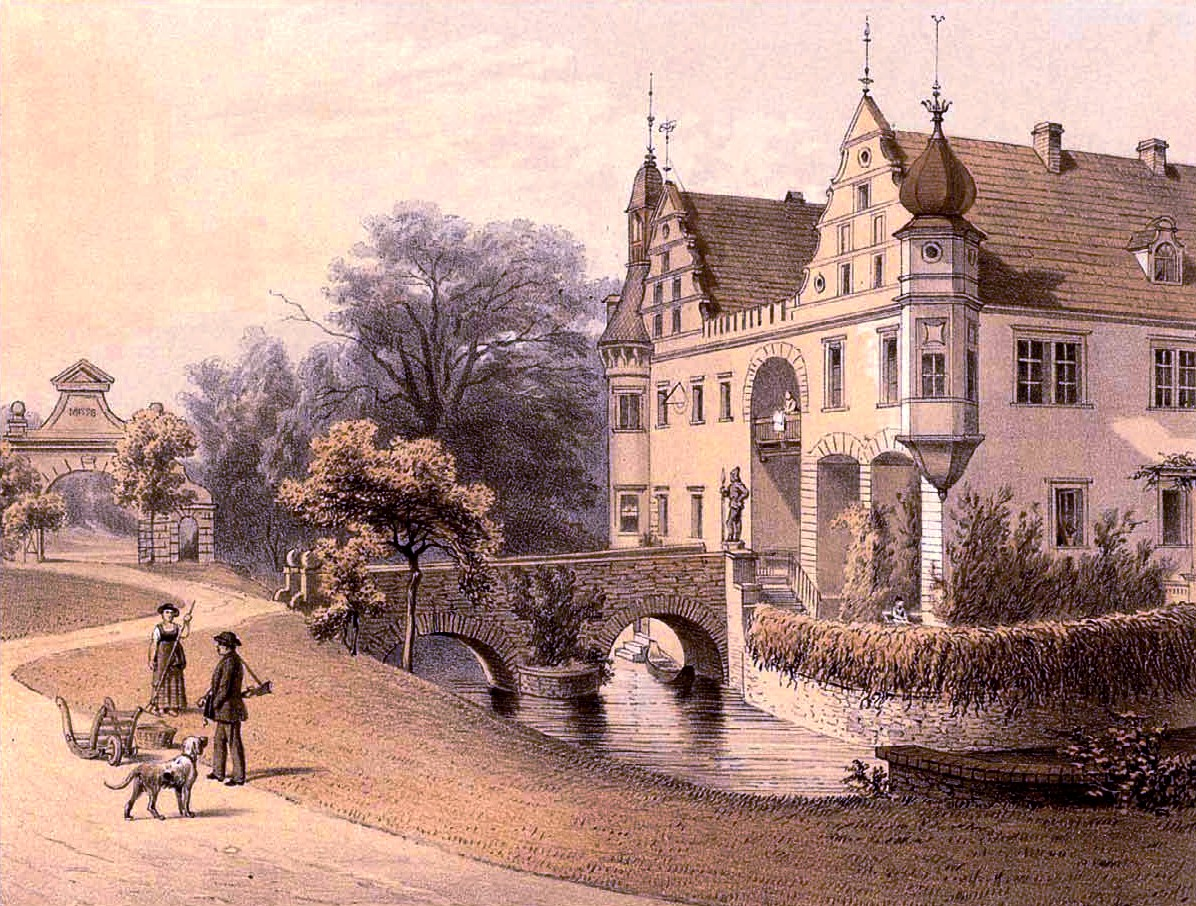 Schloss Klein-Rosen, Kreis Striegau, Lithographie aus der Sammlung Duncker